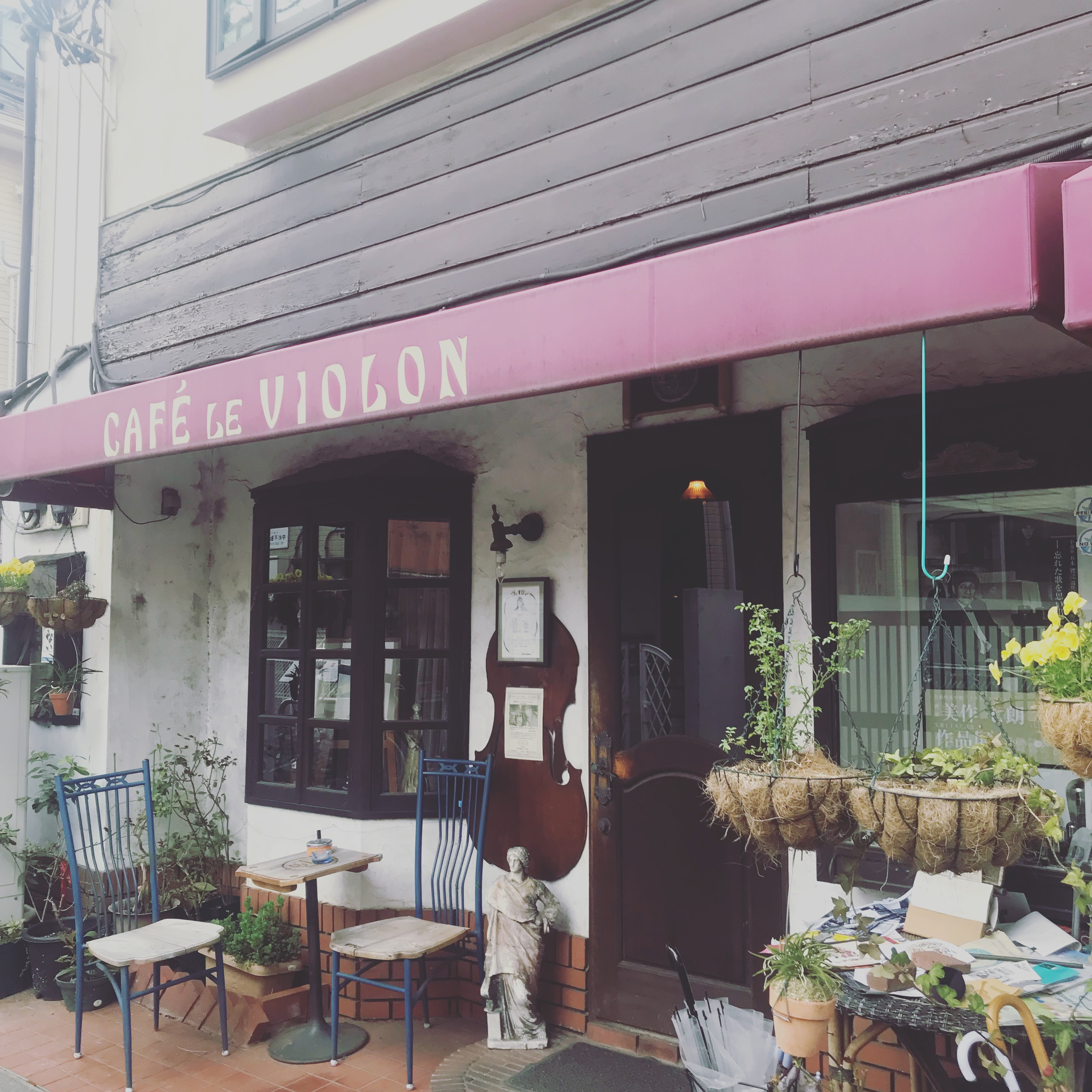 東京都杉並区阿佐ヶ谷の名曲喫茶ヴィオロン